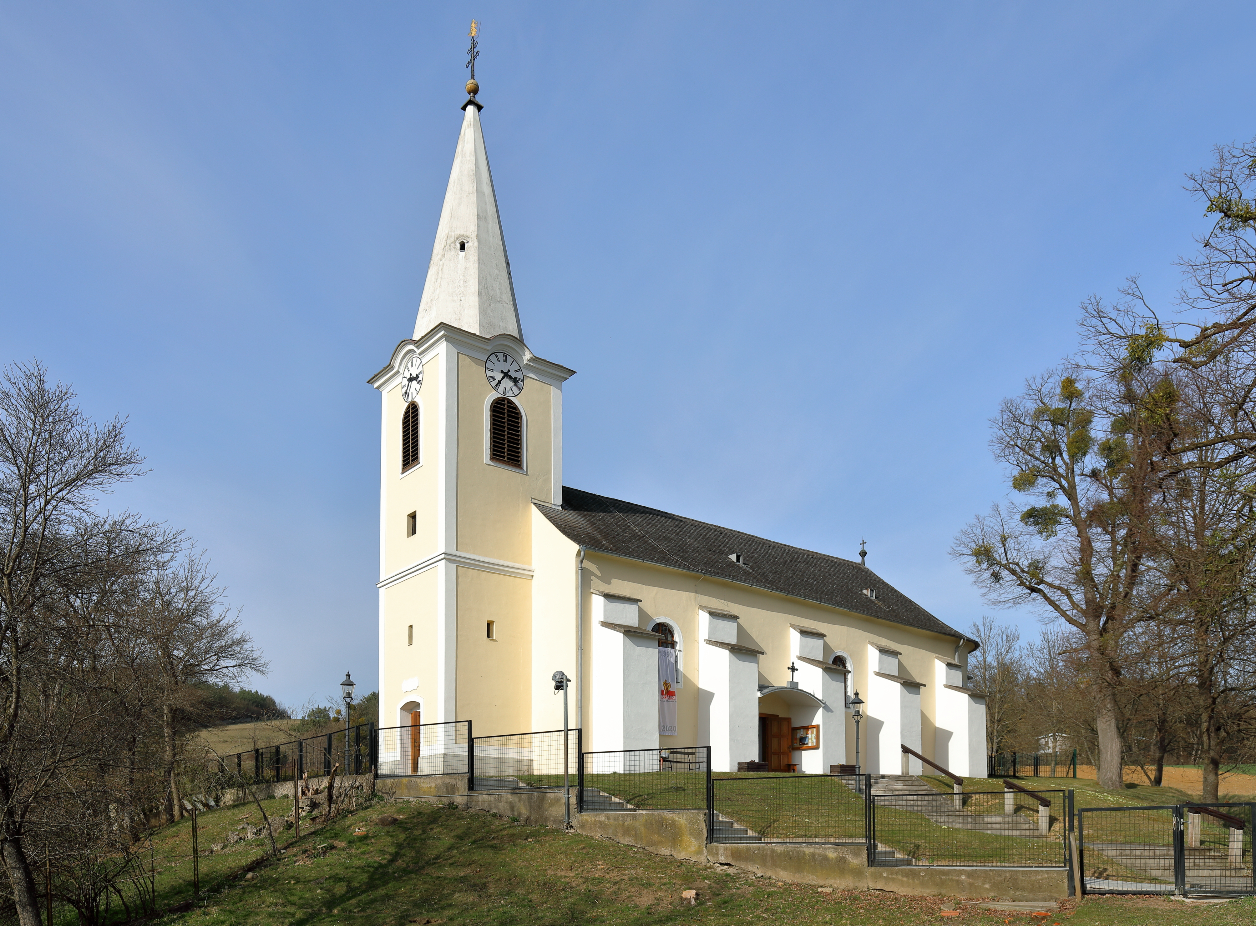 Südwestansicht der röm.-kath. Pfarrkirche hl. Petrus und Paulus in Unterrabnitz, ein Ortsteil der burgenländischen Gemeinde Unterrabnitz-Schwendgraben. Der einfache Bau mit Westturm und halbrundem Chor wurde anstelle einer Vorgängerkirche 1772 errichtet und ist von einem Friedhof umgeben.